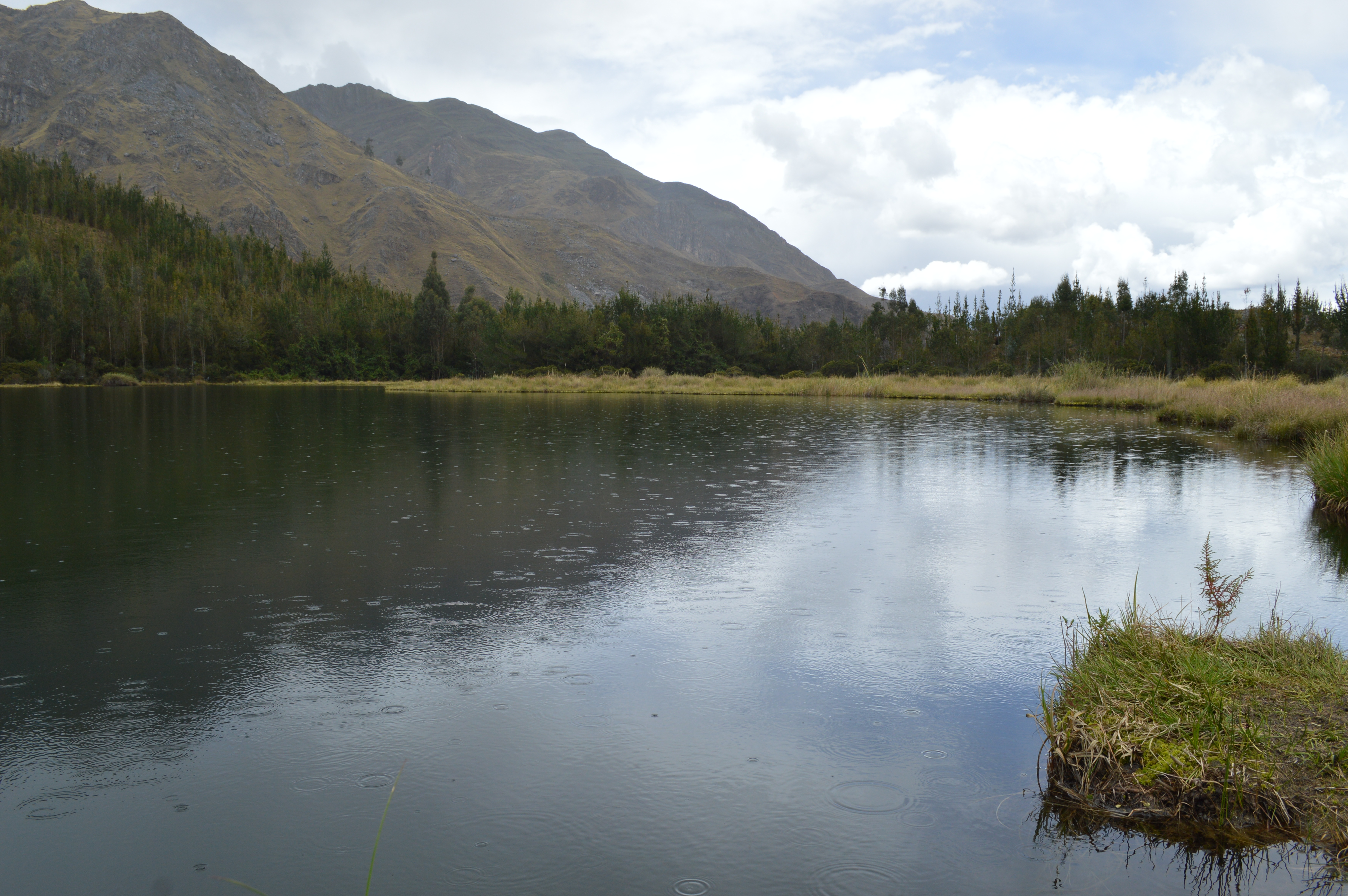 Laguna Reparin, vista desde el oeste, en el distrito de Cajay. Es uno de los atractivos turísticos de la provincia de Huari en Áncash.